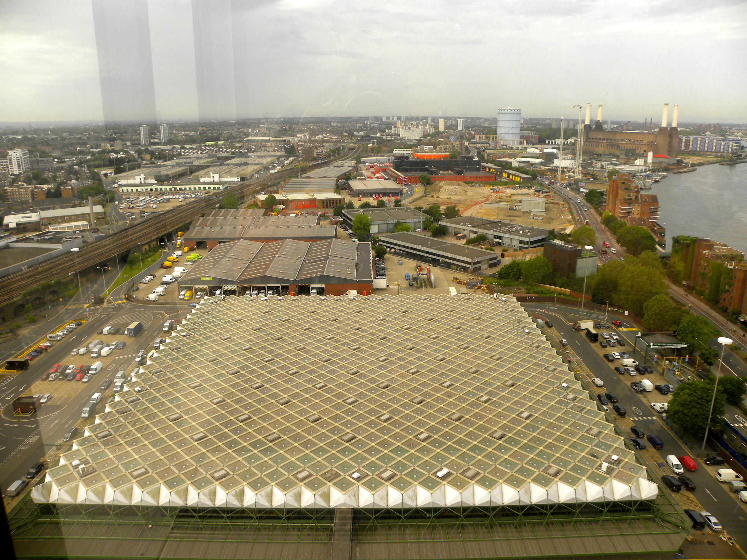 Flower market foreground, fruit and veg market behind. Photo taken in 2012.